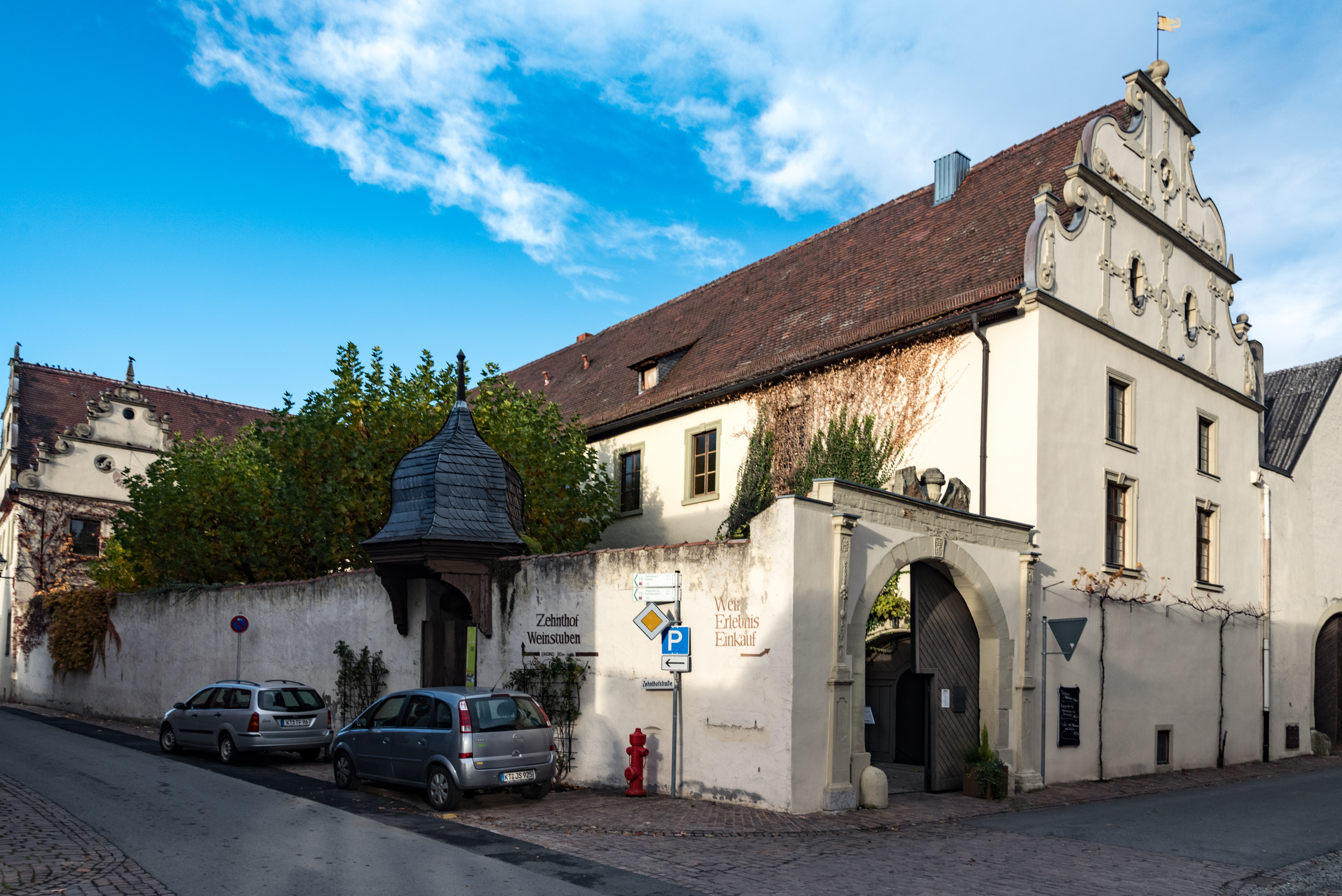 Nordheim am Main, Hauptstraße 2